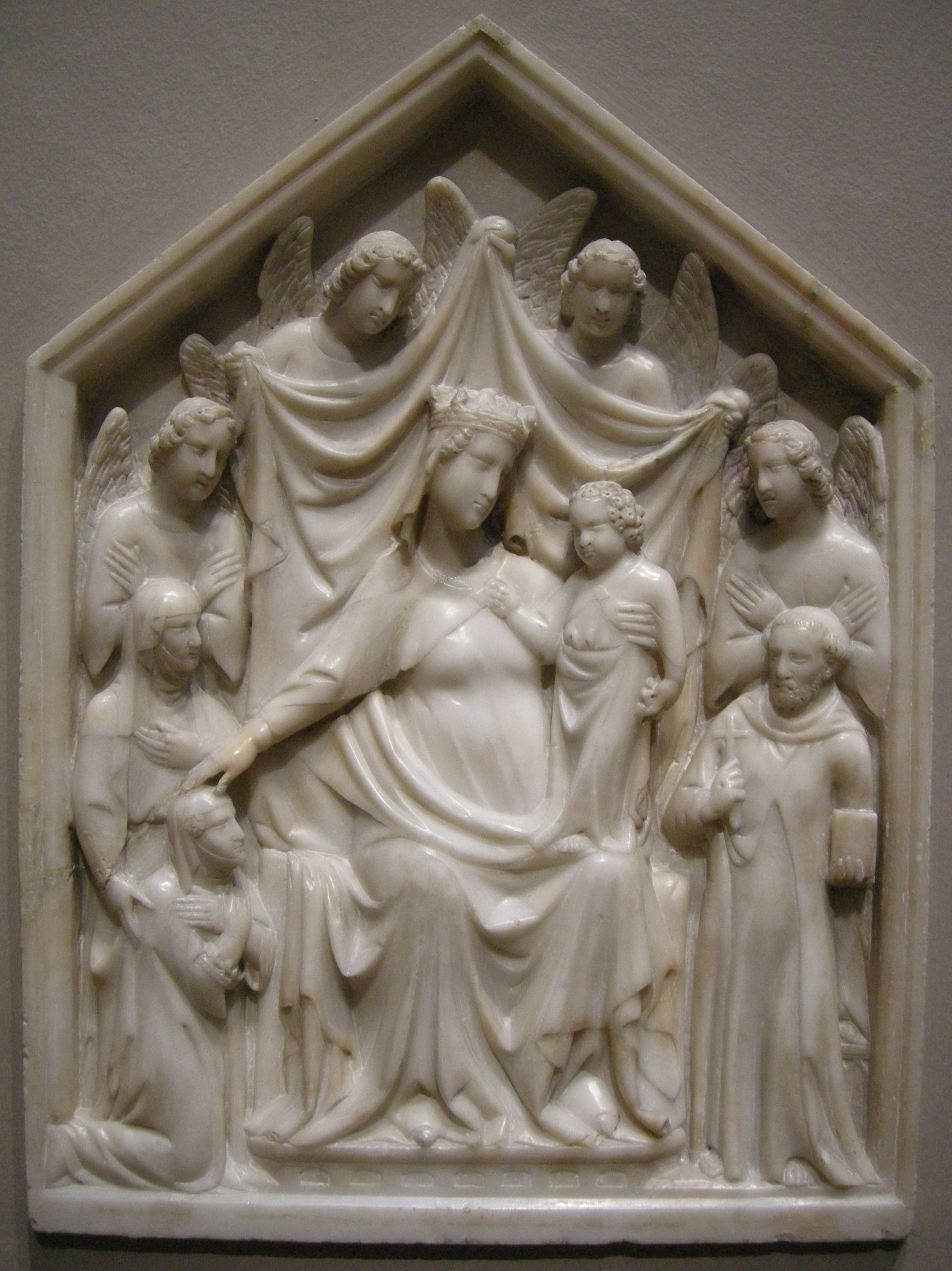 Tino di camaino, madonna col bambino, la regina sancia, angeli e santi, 1335 circa